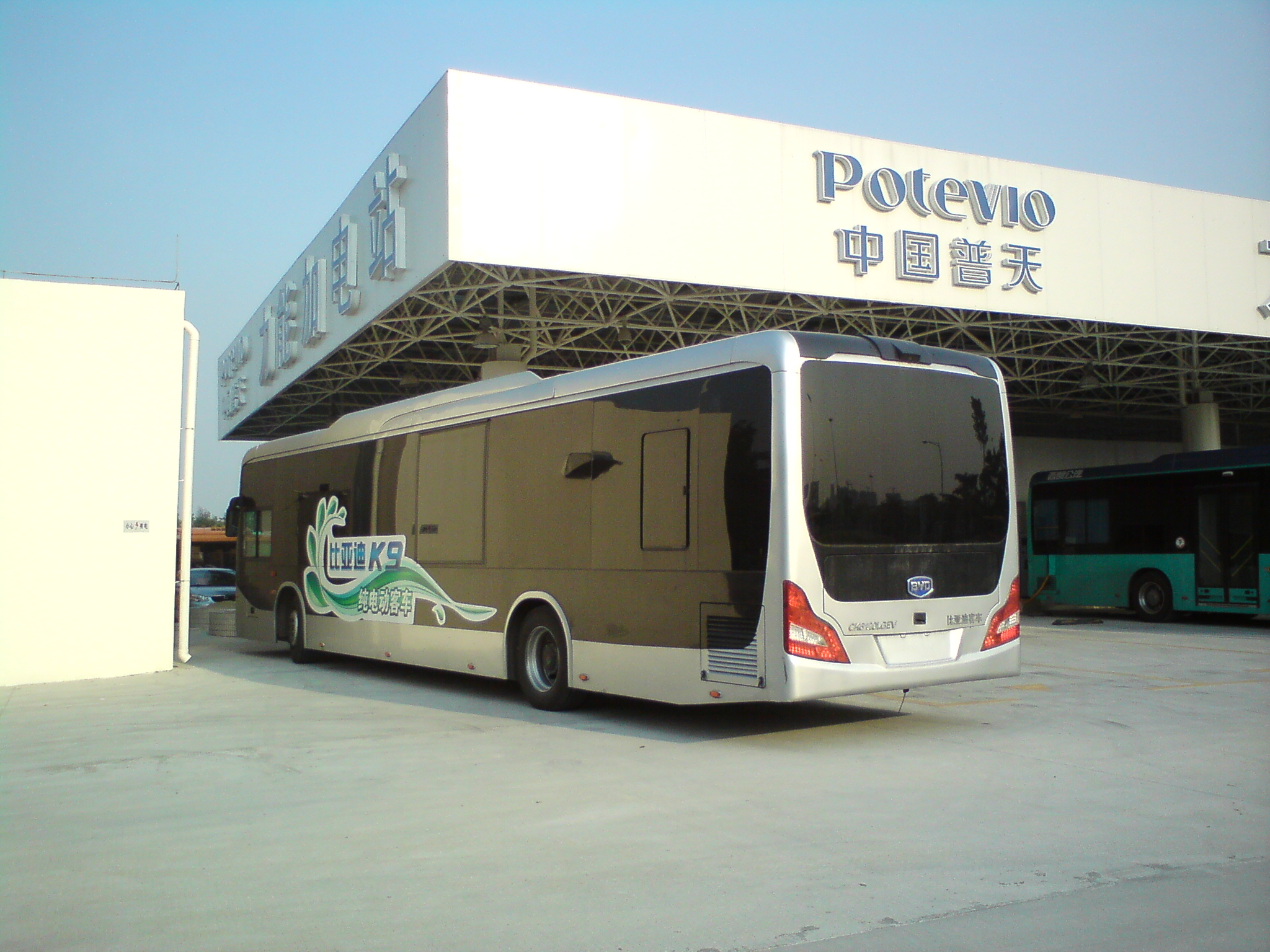 深圳灣口岸充電站